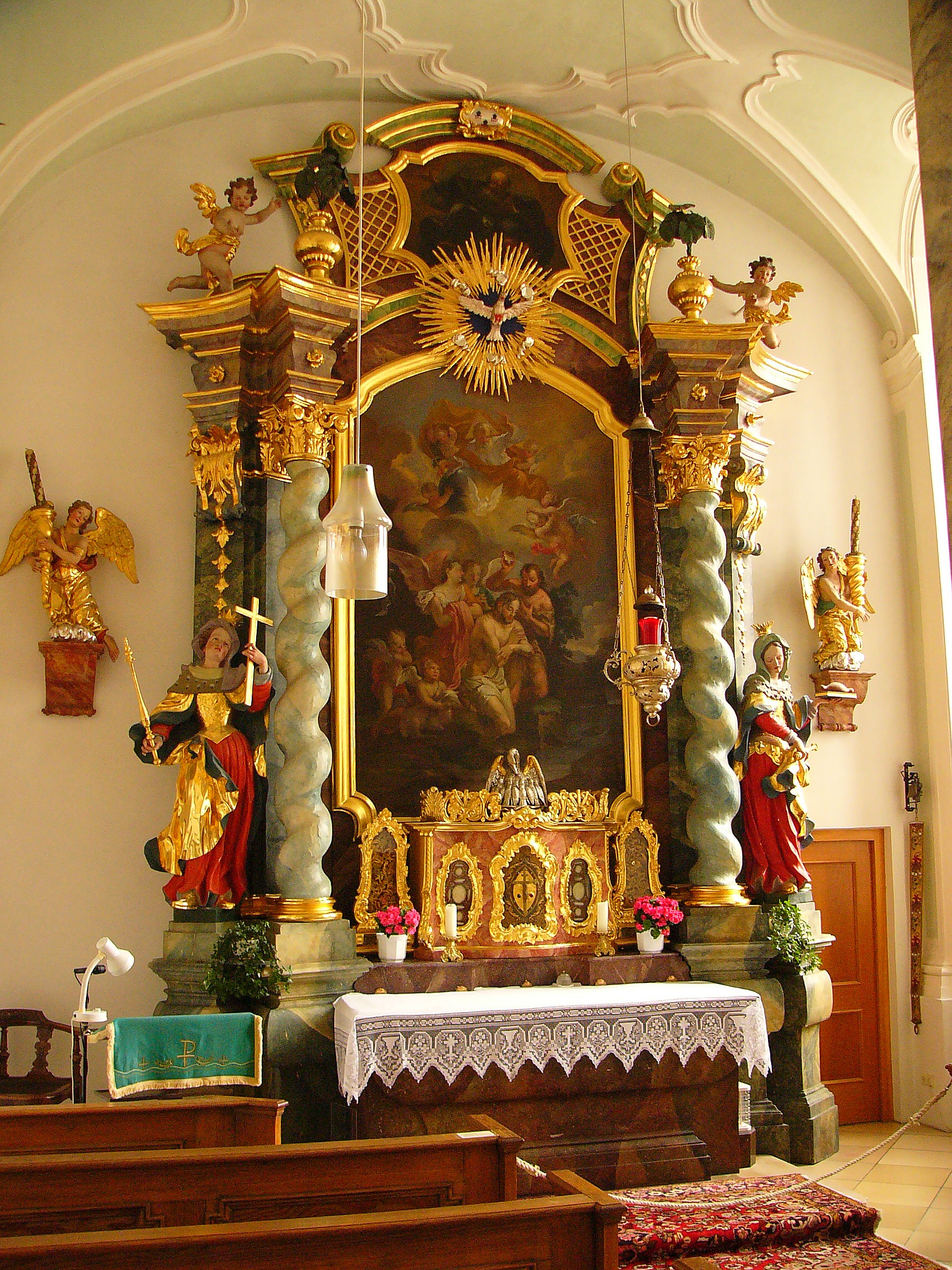 In der Elisabethkapelle im Hl. Geistspital.This is a photograph of an architectural monument.